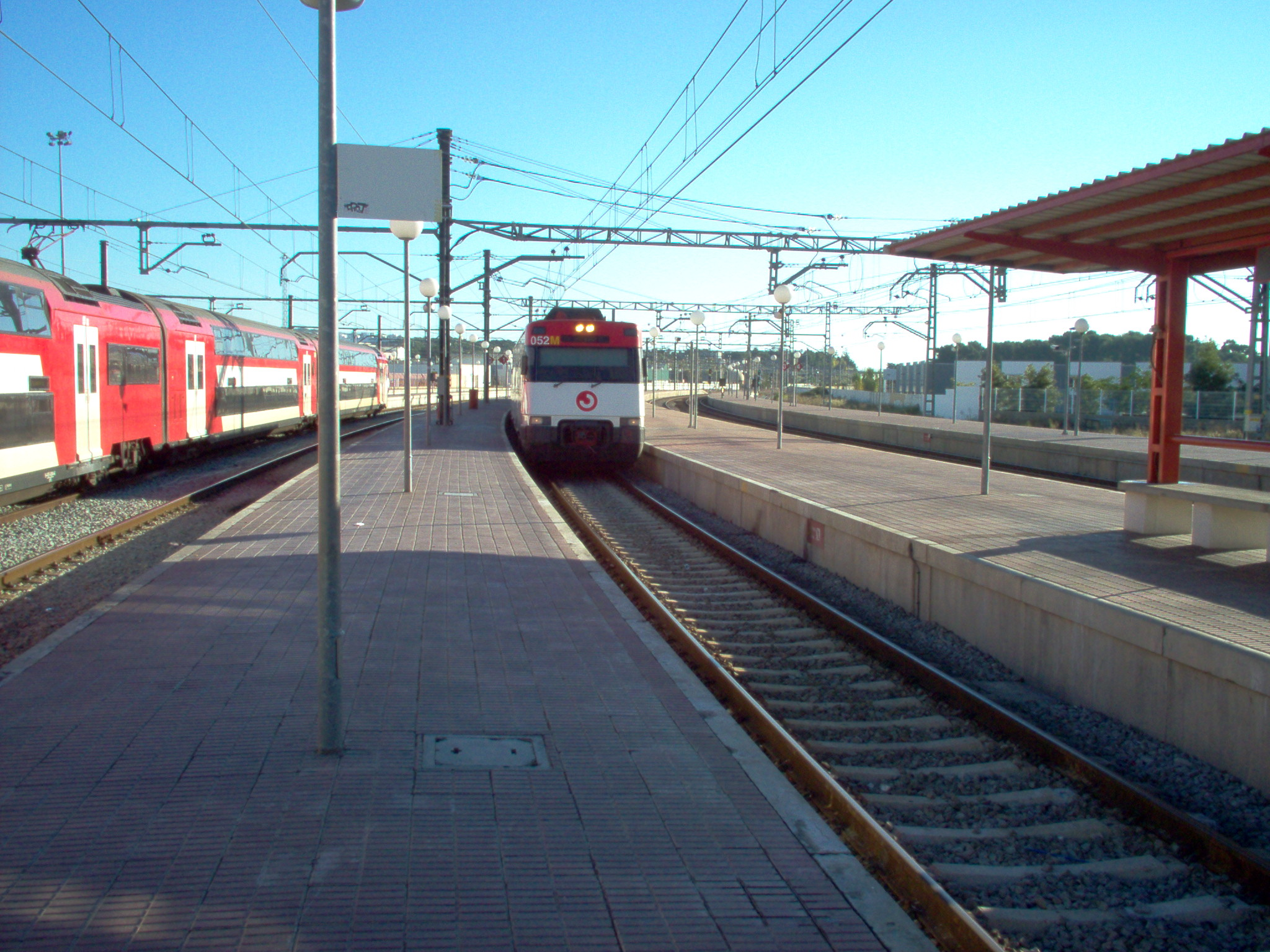 Train Renfe en gare de Figueras02 Photo Utilisateur:GôTô